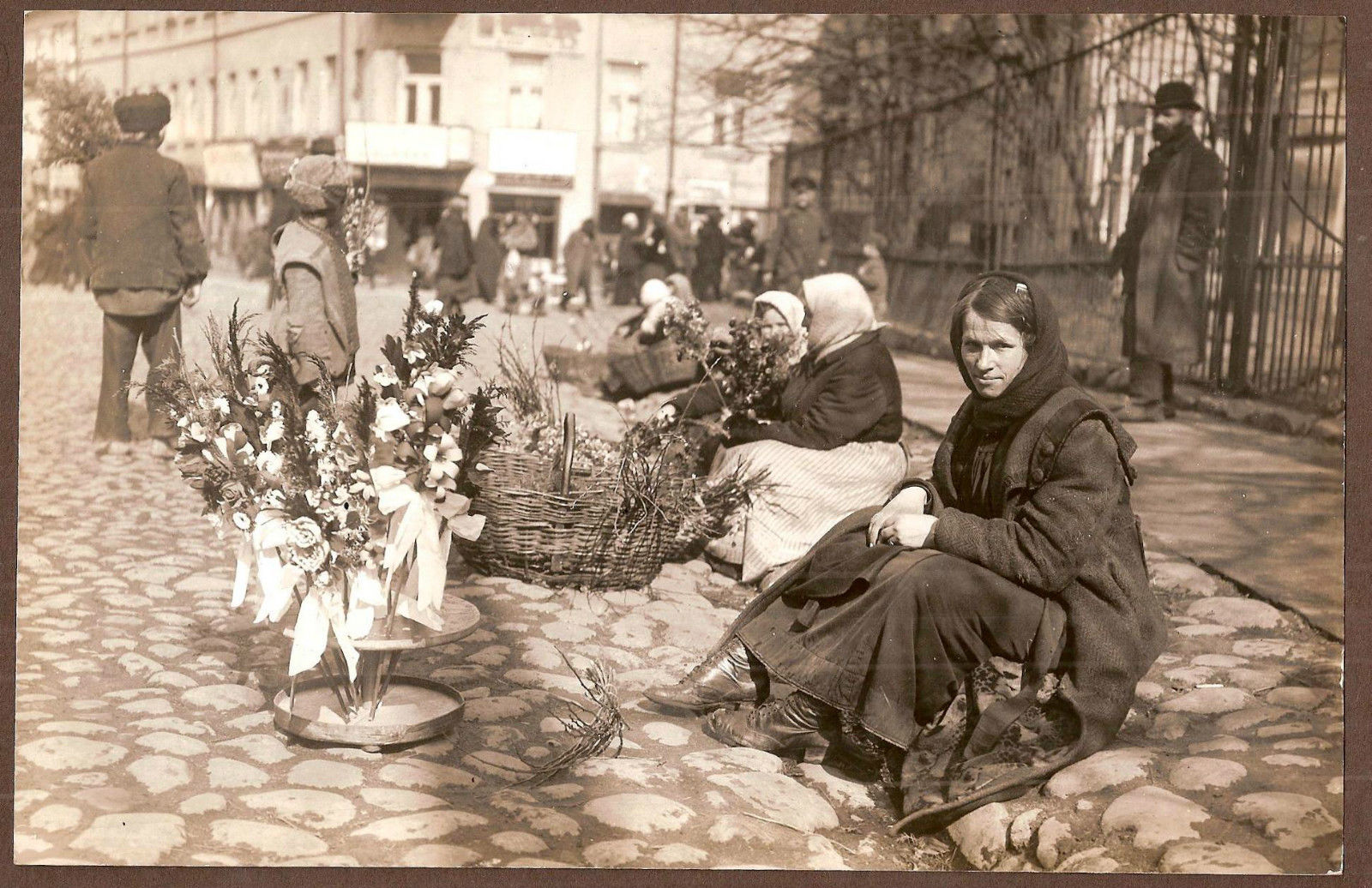 Vilnietė pardavinėja verbas prie Visų šventųjų bažnyčios Rūdninkų gatvėje, 1916 m.